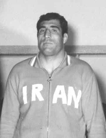 Abolfazl Anvari